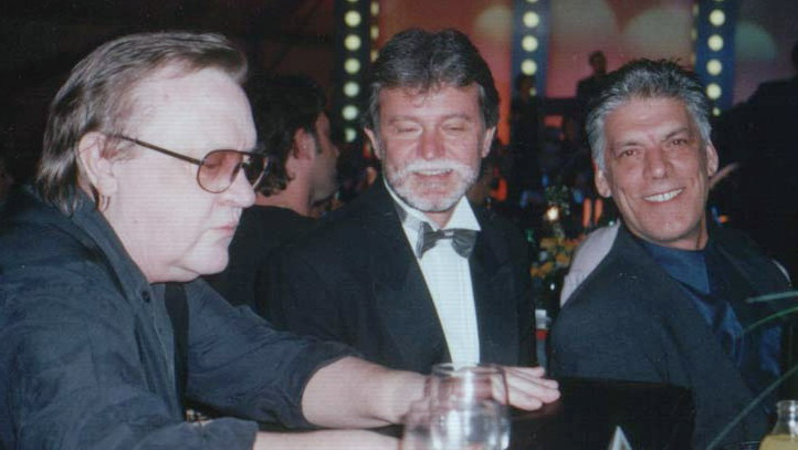 Veljko Despot s Arsenom Dedićem i Sinišom Škaricom, Porin, Makarska 1999.